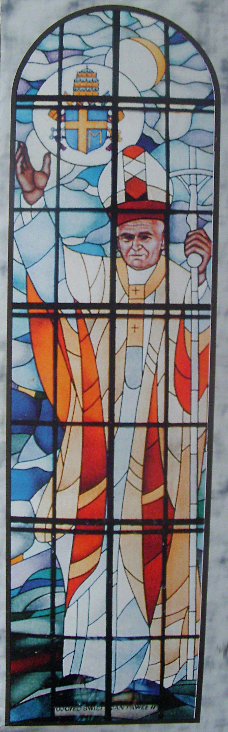 Jan Paweł II - witraż w kościele Imienia Maryi w Bączalu Dolnym (diecezja rzeszowska)